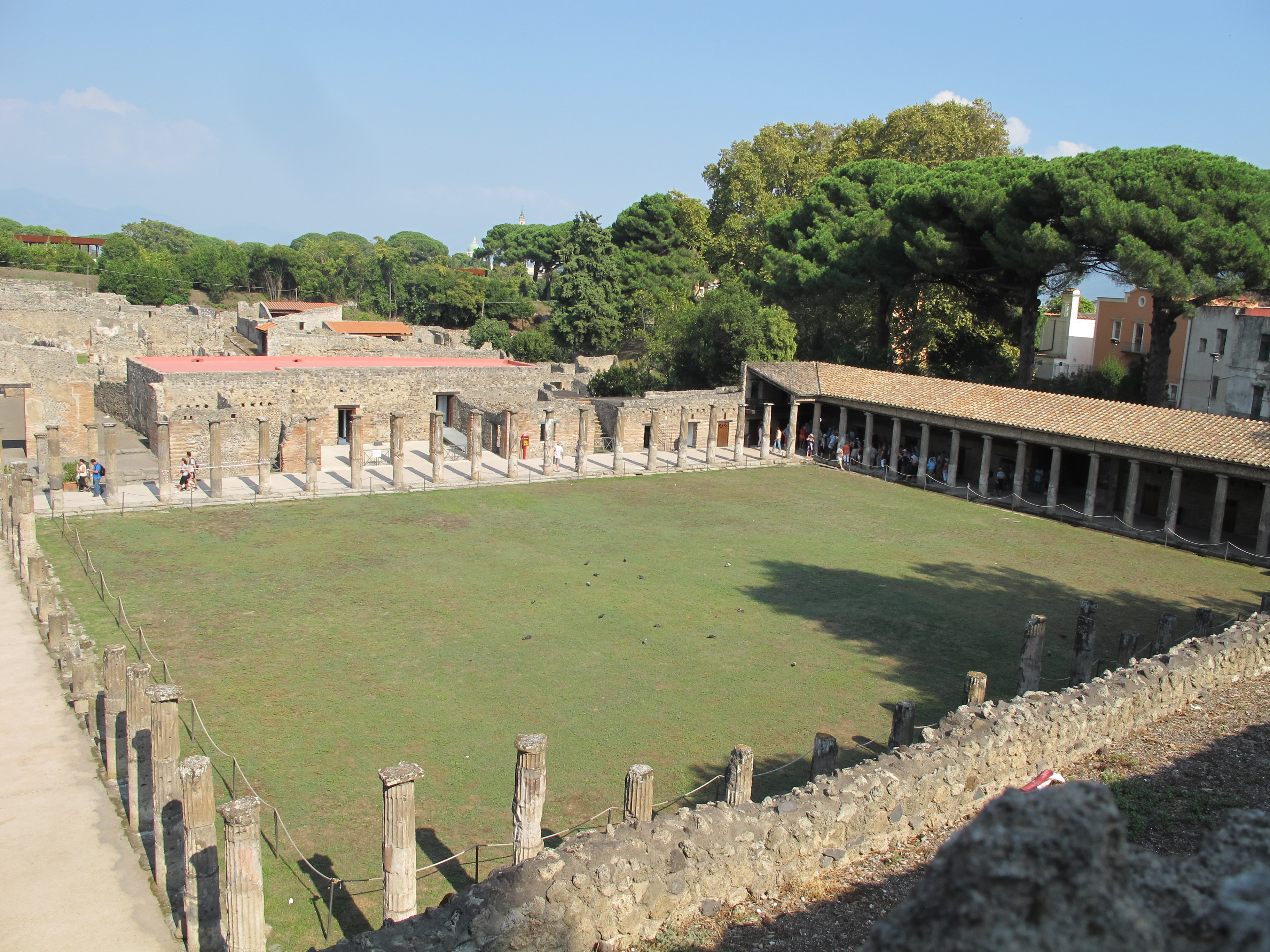 Pompei 2012